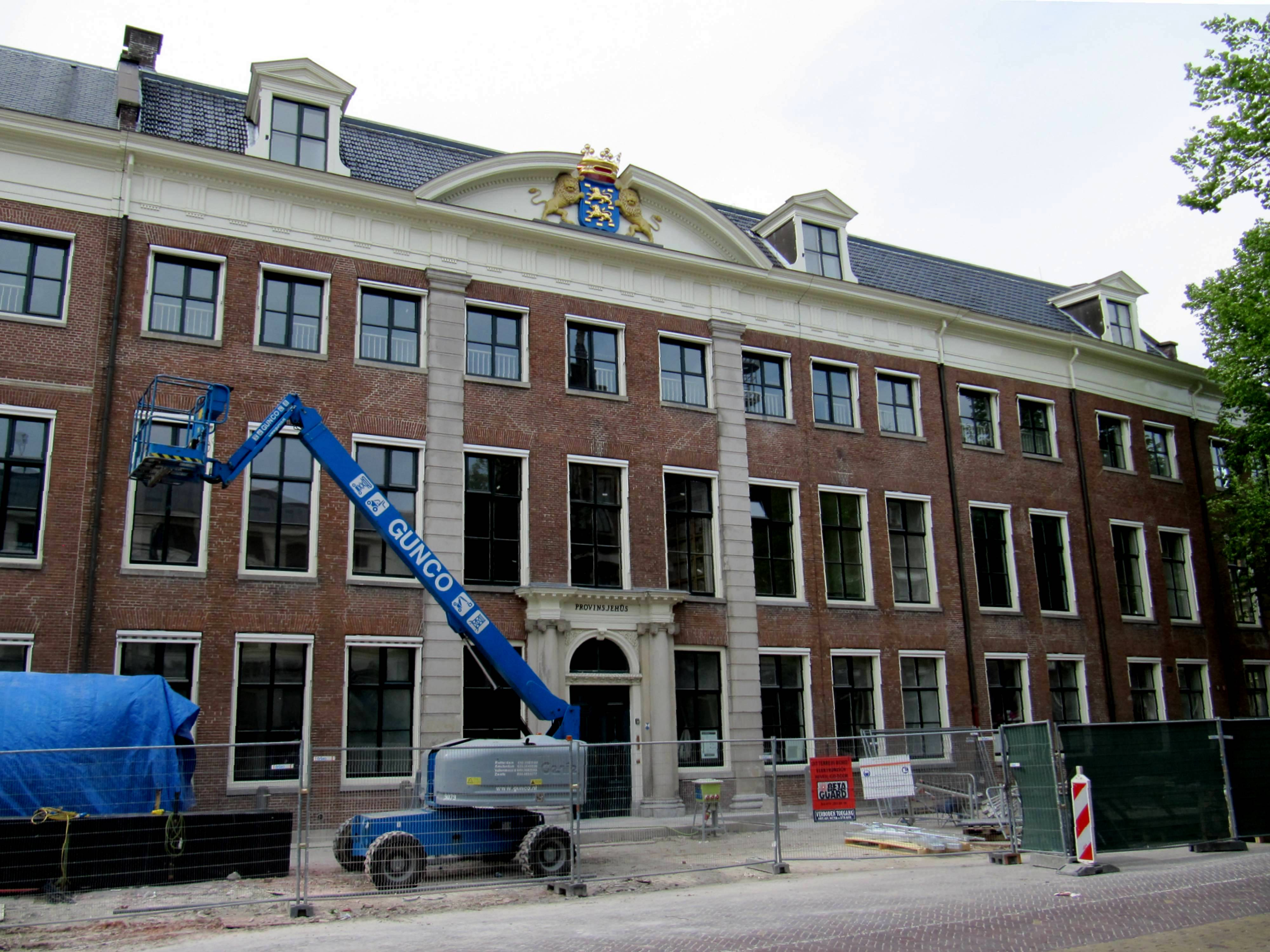 Provinciale Griffie, in pand met elf traveeën brede gevel waarvan de middelste zes een ondiep risaliet vormt, bekroond door segmentvormig fronton, 1784 opgetrokken.